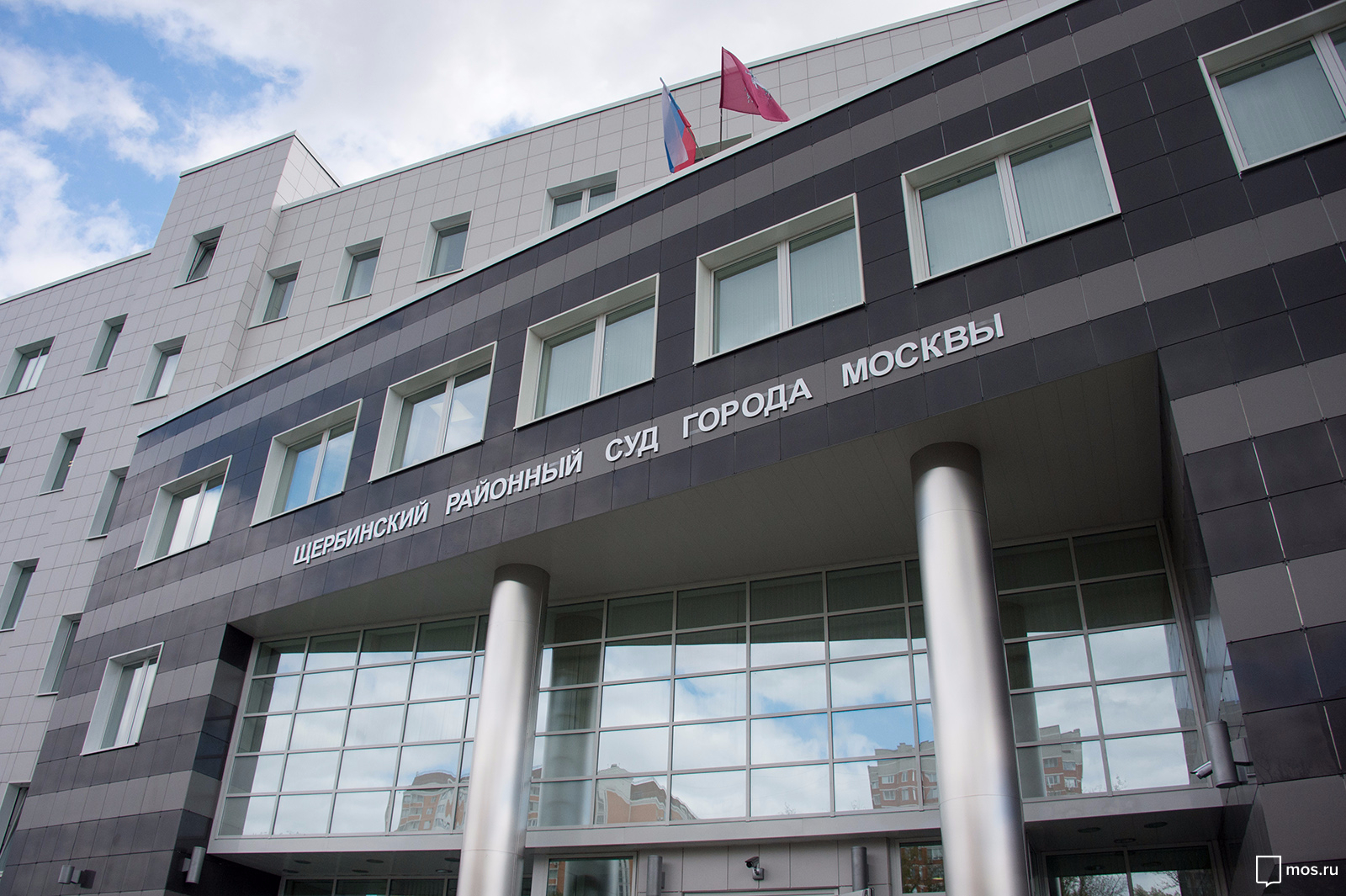 Здание Щербинского районного суда (сентябрь 2016).